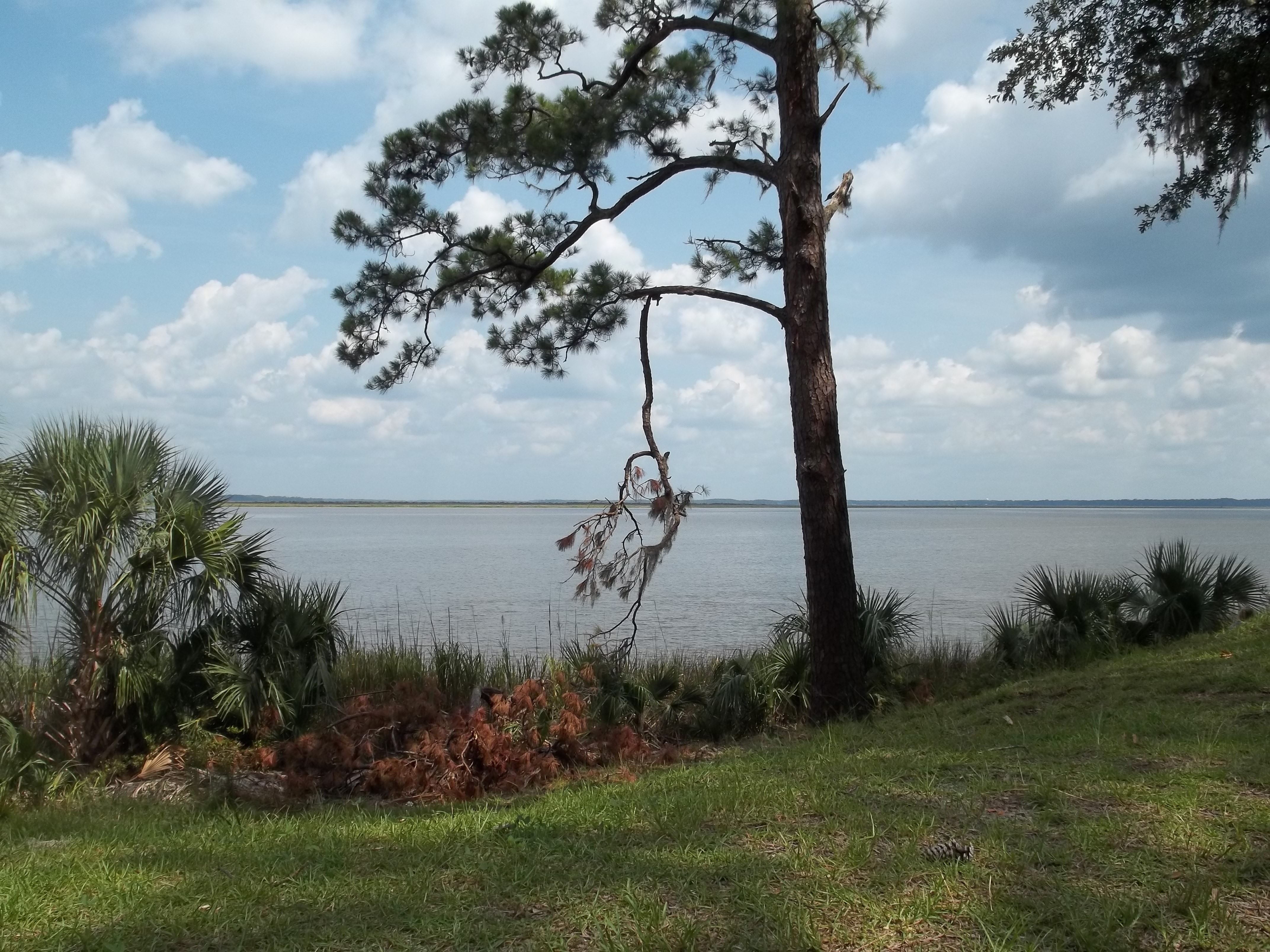 Darien, Georgia: Fort McAllister Historic Park: Ogeechee River